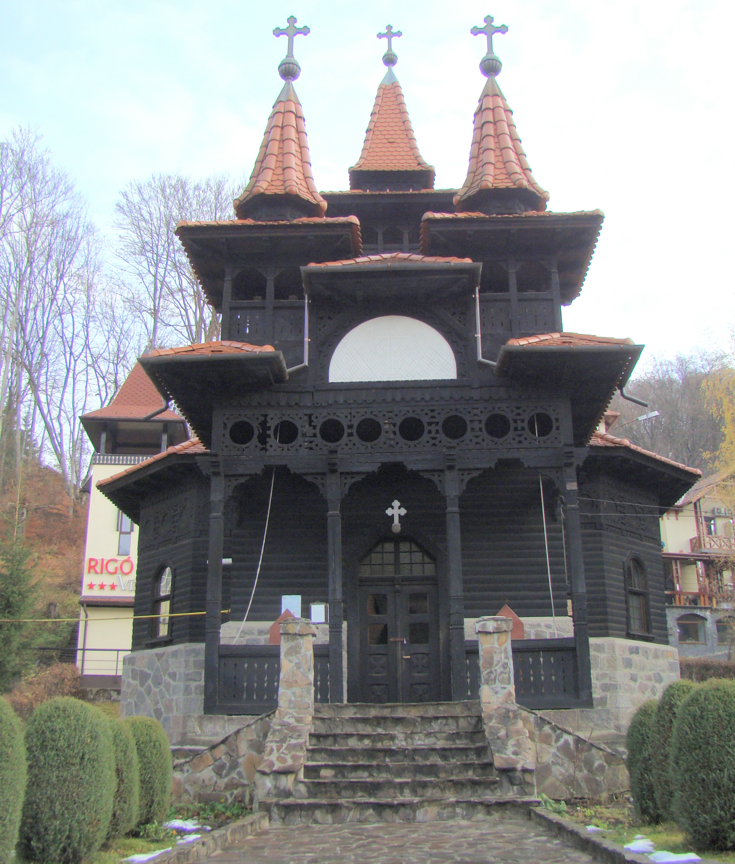 Biserica de lemn Schimbarea la Faţă din Sovata, judeţul Mureş